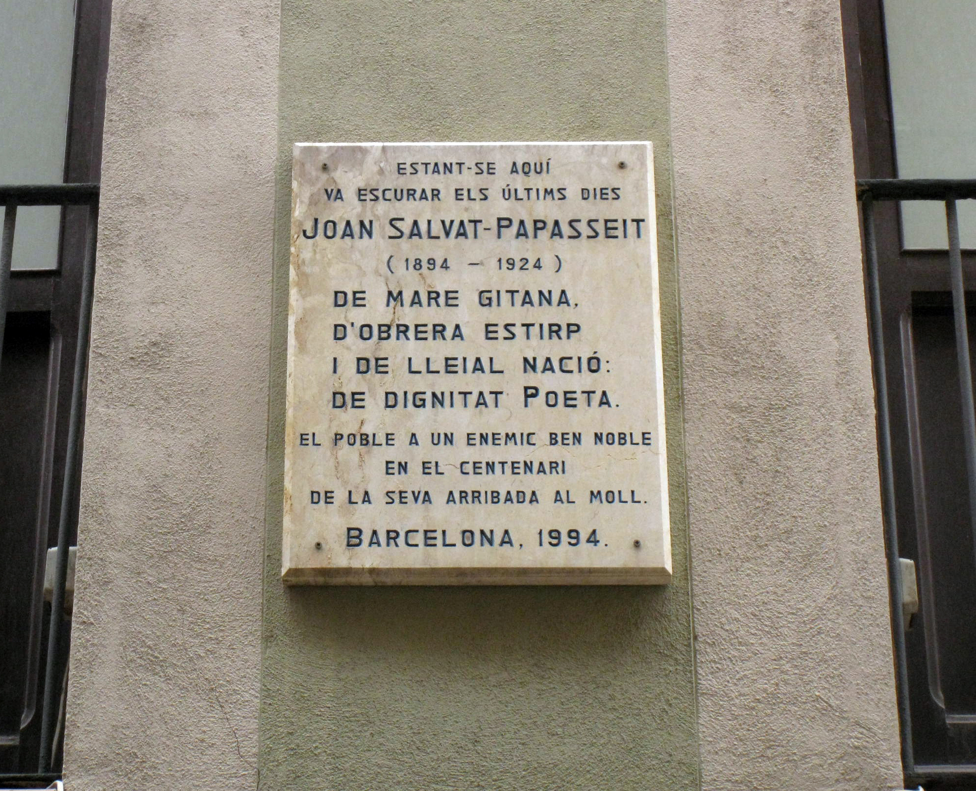 Joan Salvat-Papasseit. C. Argenteria, 64 (Barcelona)